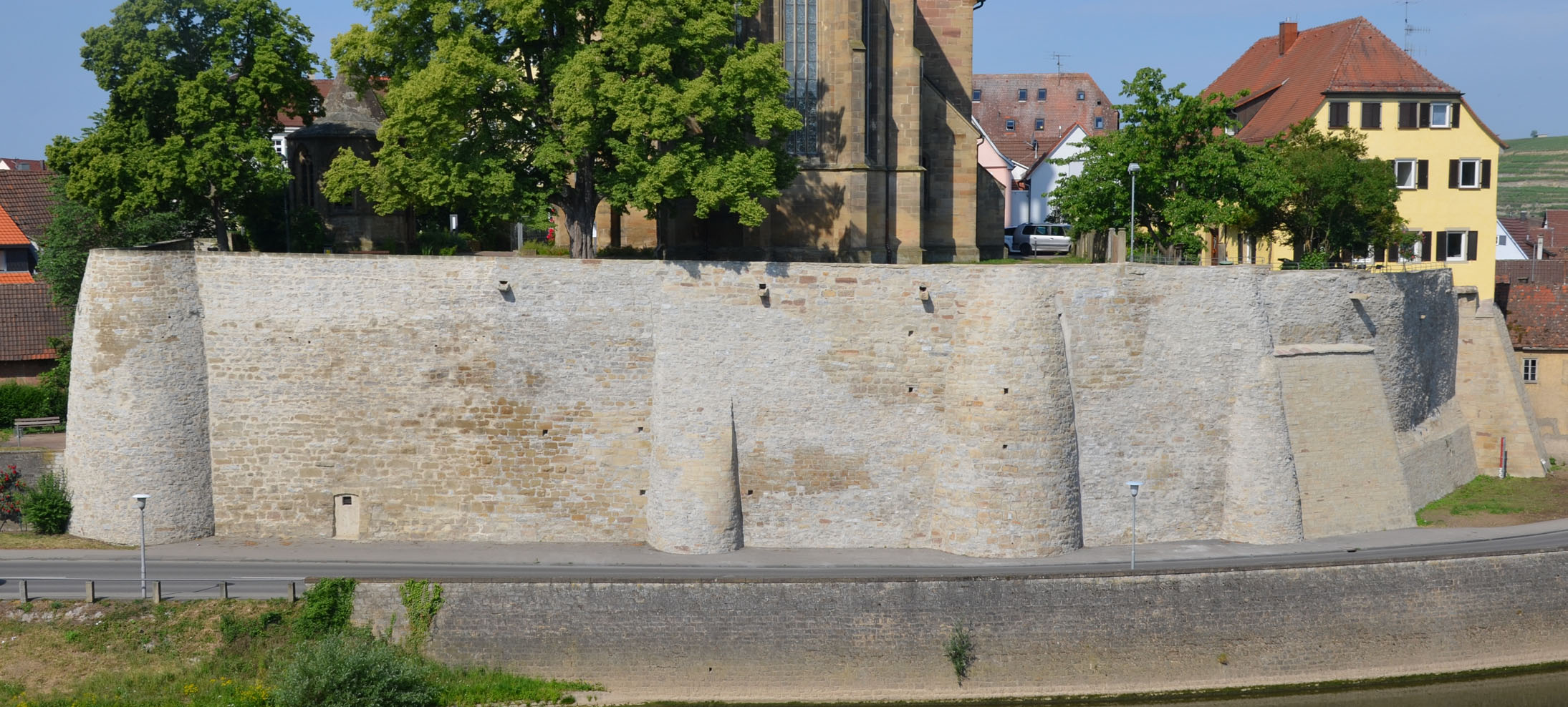 denkmalgeschützte Befestigung von Lauffen-Dorf zwischen der Regiswindiskirche und dem Neckar.